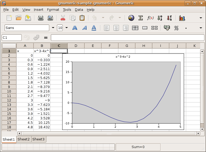 Gnumeric on Ubuntu 6.06.